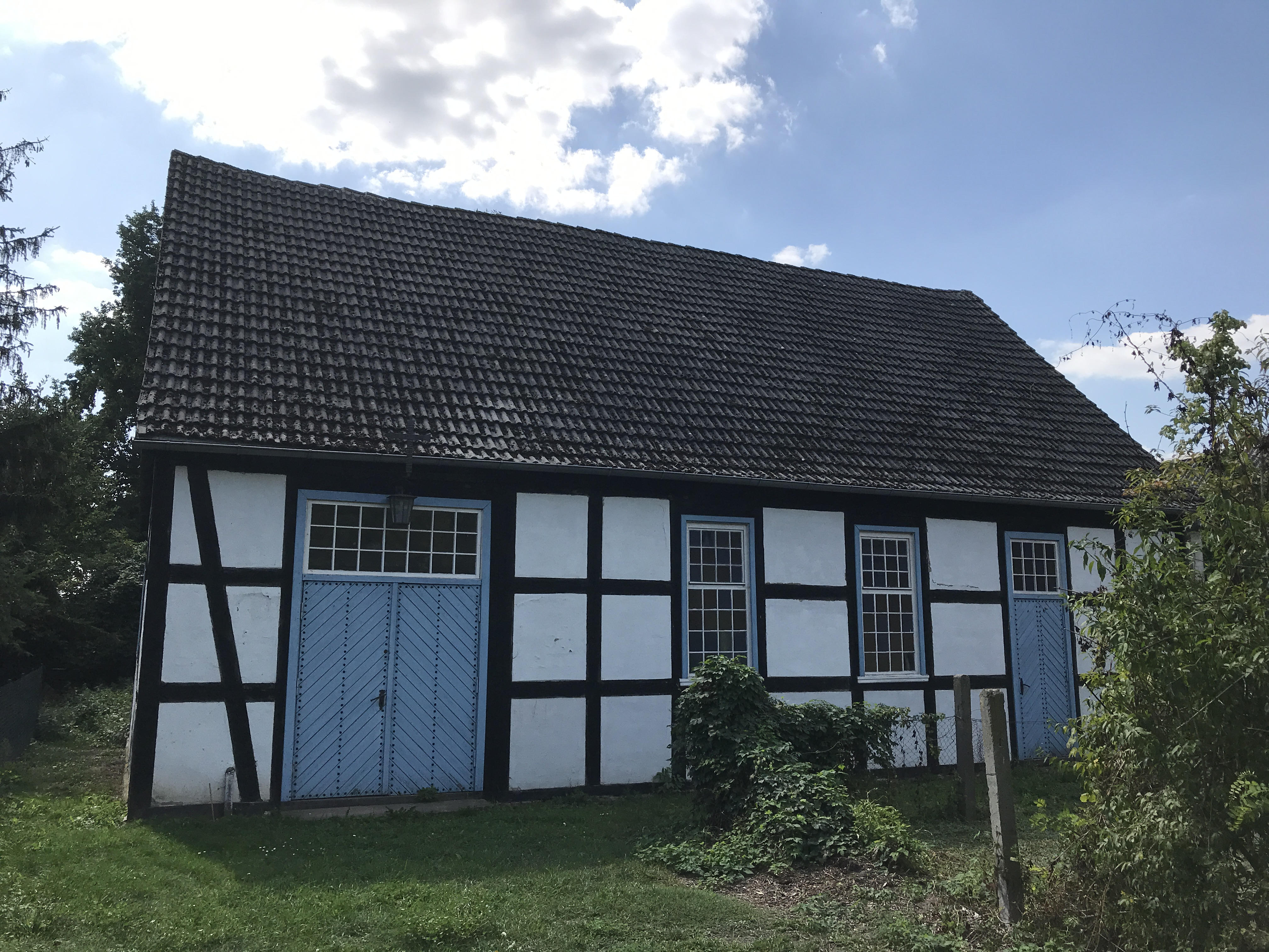 Die Dorfkirche Wilmersdorf entstand 1936 in einer ehemaligen Scheune in Wilmersdorf, einem Ortsteil der Stadt Angermünde im Landkreis Uckermark im Land Brandenburg. Im Innern stehen unter anderem eine Kanzel sowie ein Patronatsgestühl aus der Bauzeit.